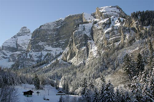 Stöckalp (Talstation des Skigebiets Melchsee-Frutt) im winterlichen Mittagsschatten